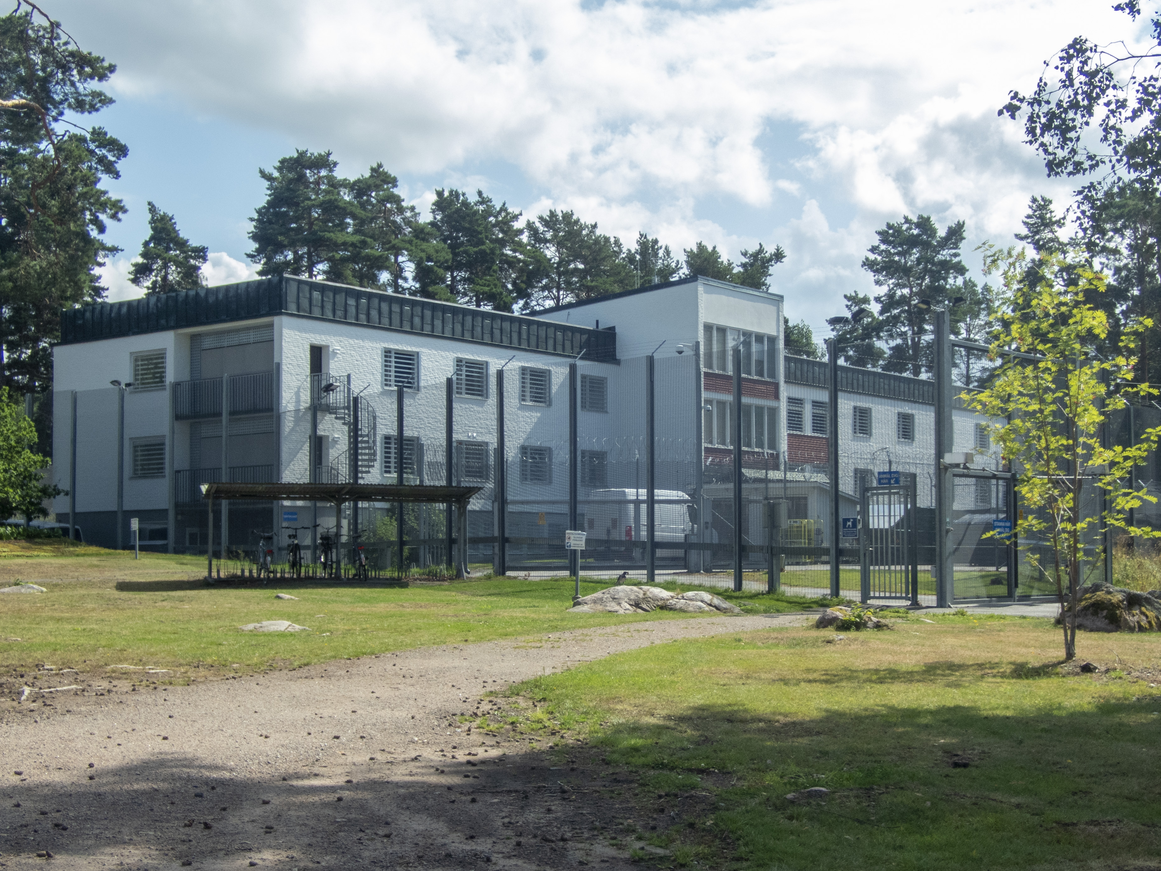 Anstalten Johannesberg i Mariestad. Uppförd 1962 som "Norrgården" inom Johannesbergsområdet. Arkitekt Leo Uulas.